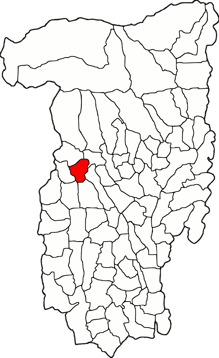 Lage der Gemeinde Stroești im Kreis Vâlcea (RO).